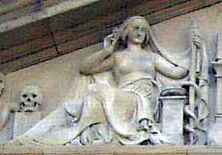 Detail from Göttingen university main building, Detail vom Giebel der Göttinger Universitätsaula